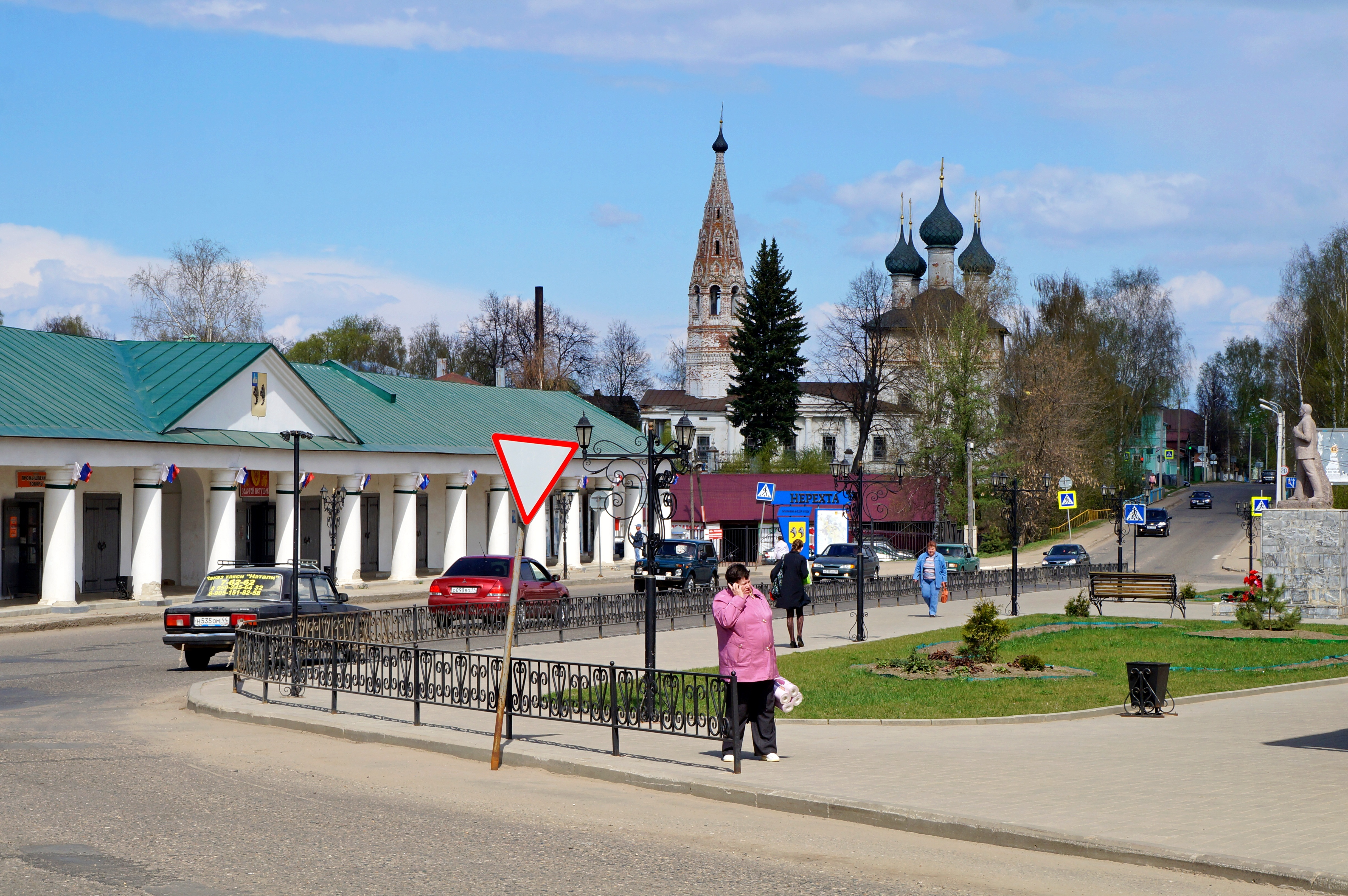 Здание Торговых рядов: площадь Свободы, Нерехта, Костромская область